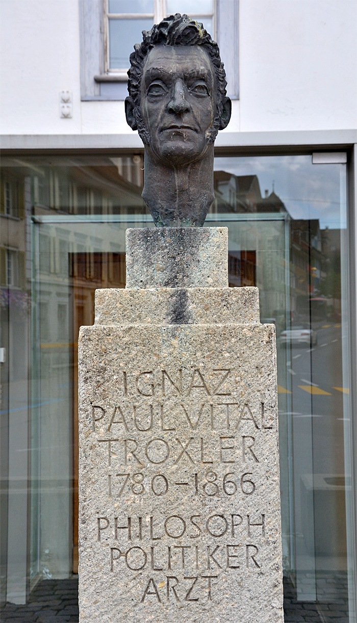 Ignaz Paul Troxler, Büster in Beromünster